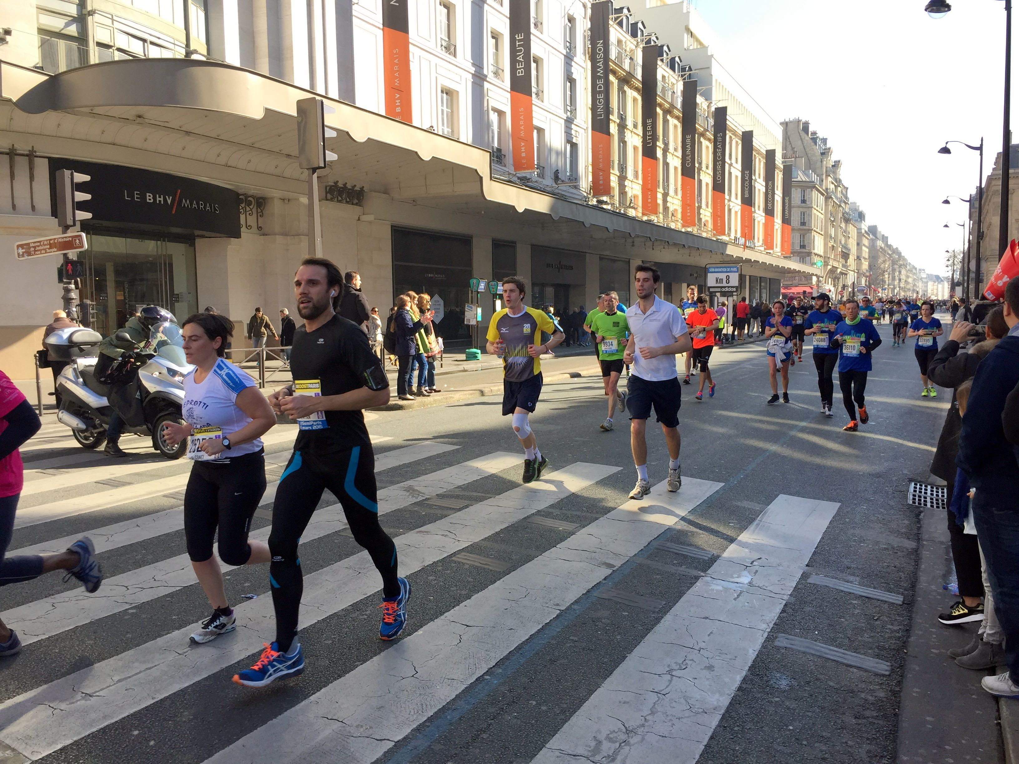 Semi-marathon de Paris, au niveau du km 8 à l'hôtel de ville.